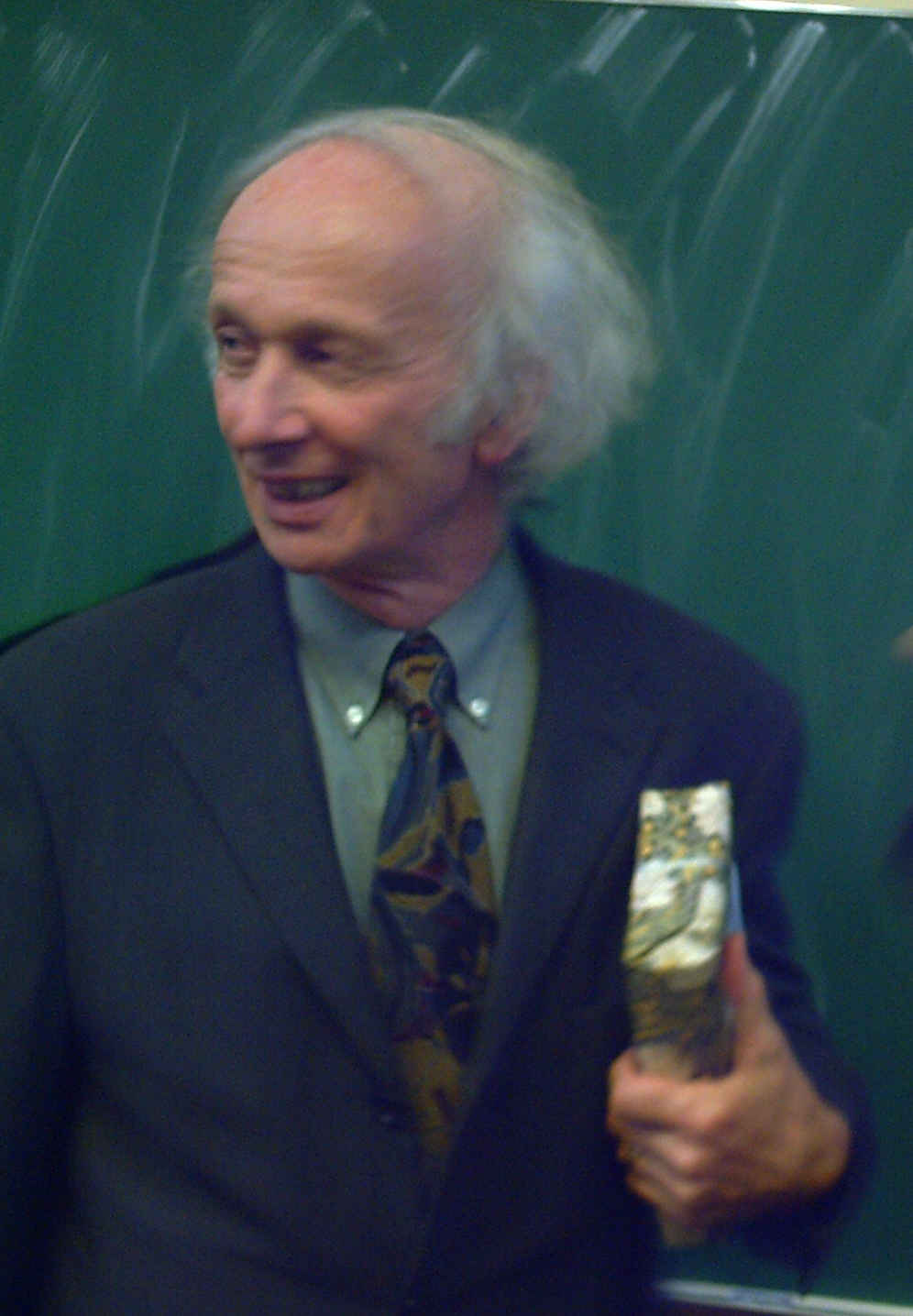 Prof. Dieter Langewiesche beim Tübinger Symposium Welche "Universität braucht die Wissensgesellschaft?" (WikiNews)